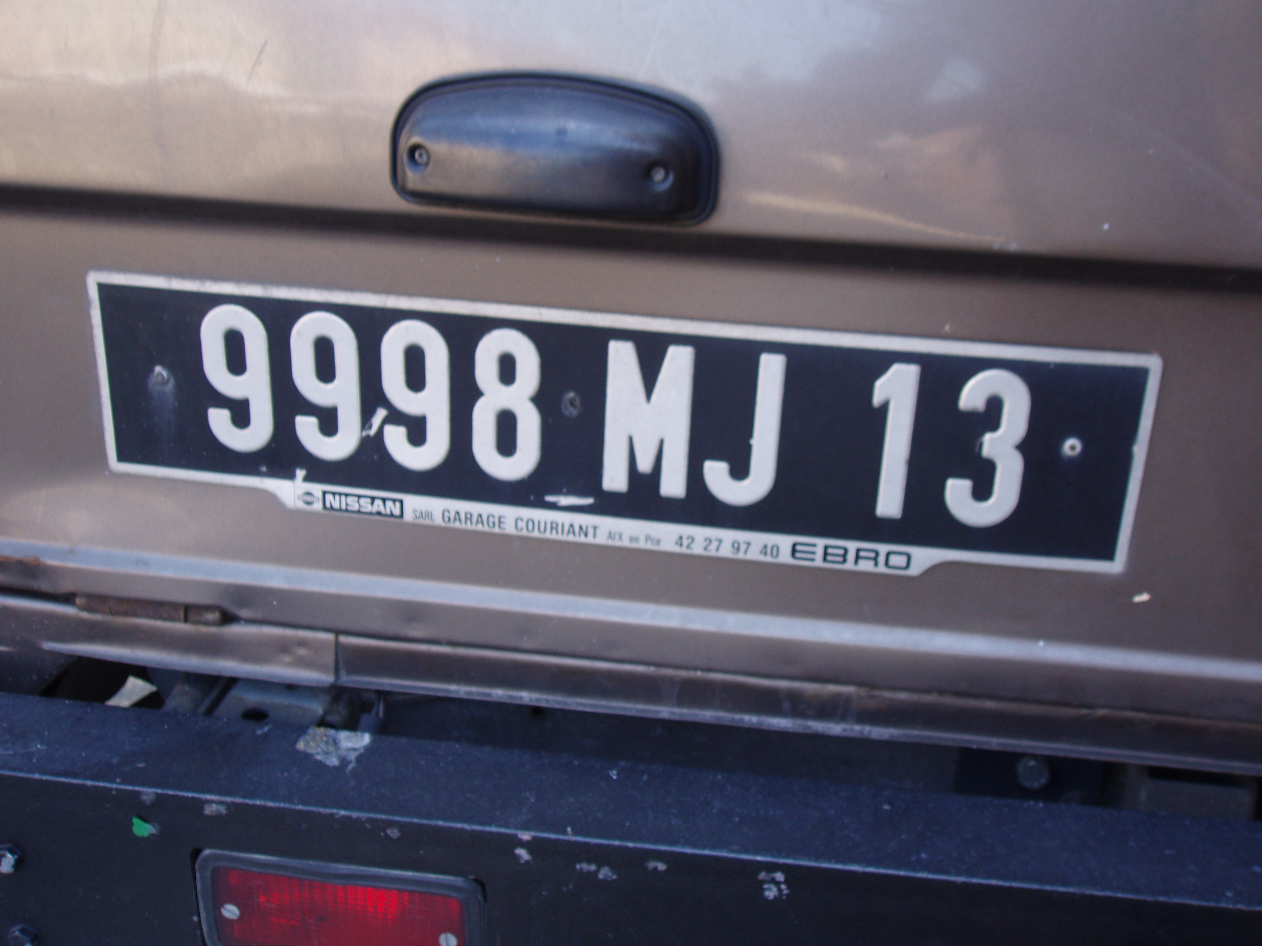 Matrícula antigua de Bocas del Ródano/Bouches-du-Rhône